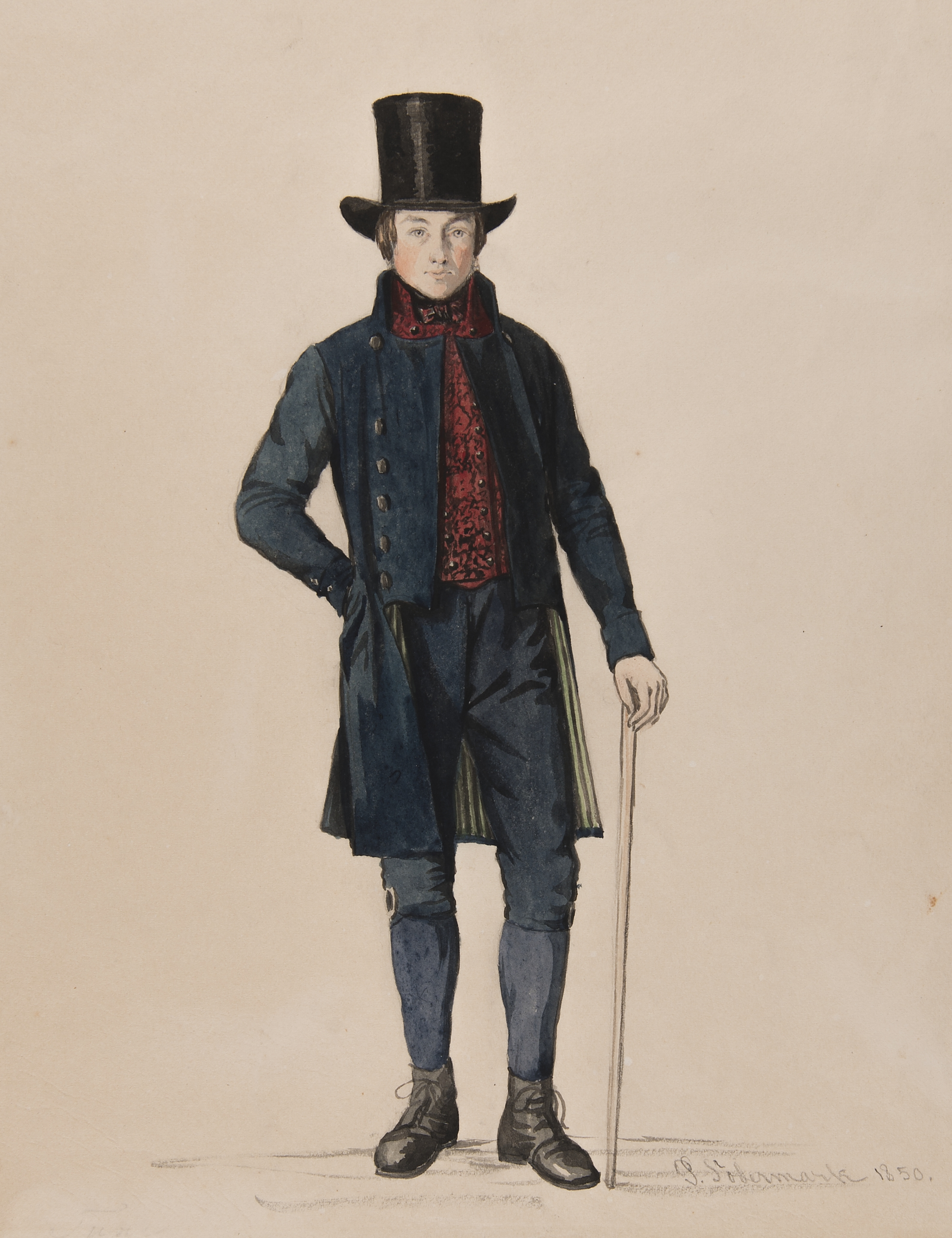 Man i dräkt. Akvarell av P.Södermark 1850. Depicted place: Stora Tuna socken (Q10681133)